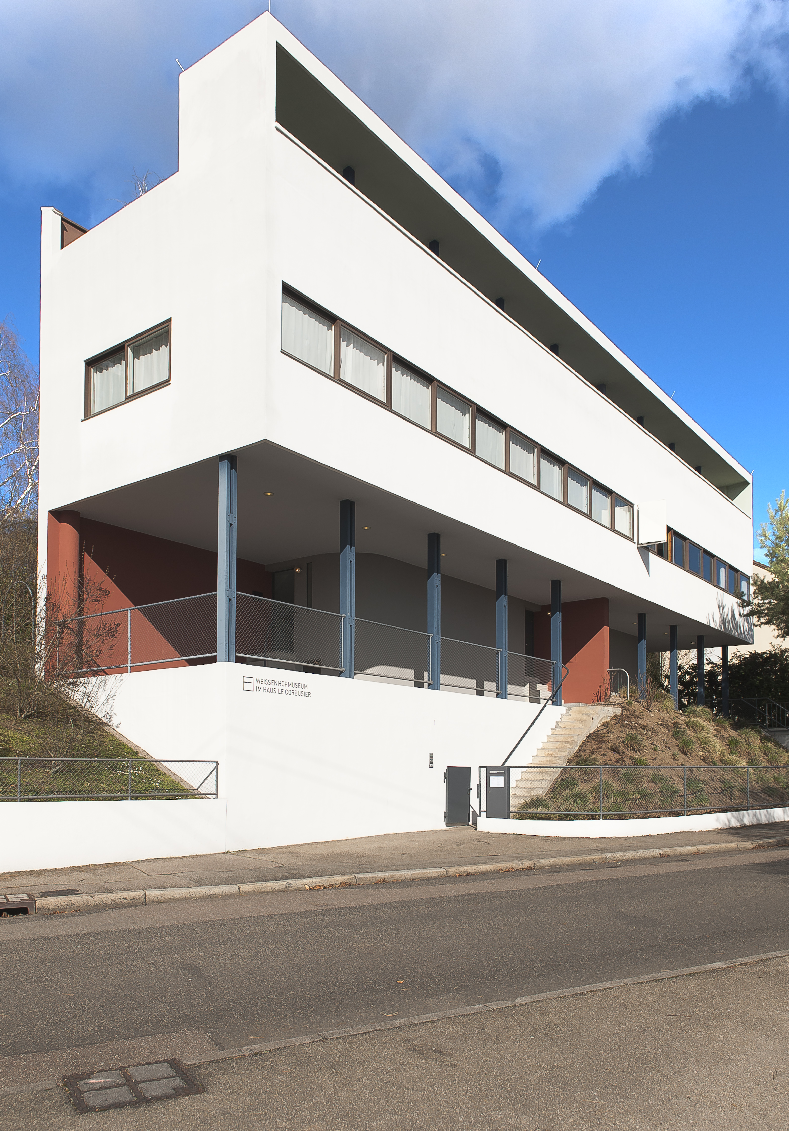 Weissenhofmuseum, Stuttgart, Architekten Le Corbusier und Pierre Jeanneret